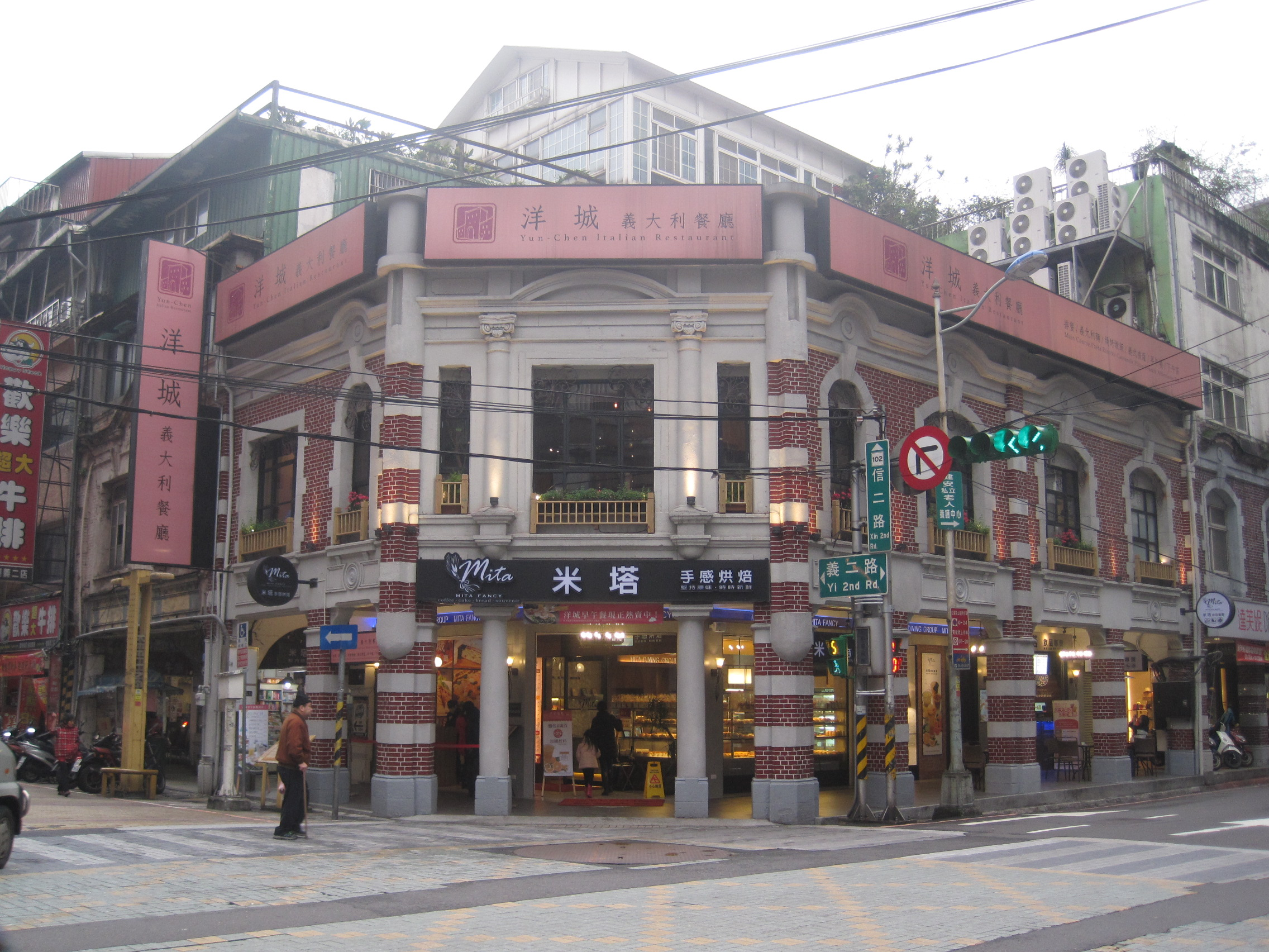 基隆義重町老街屋